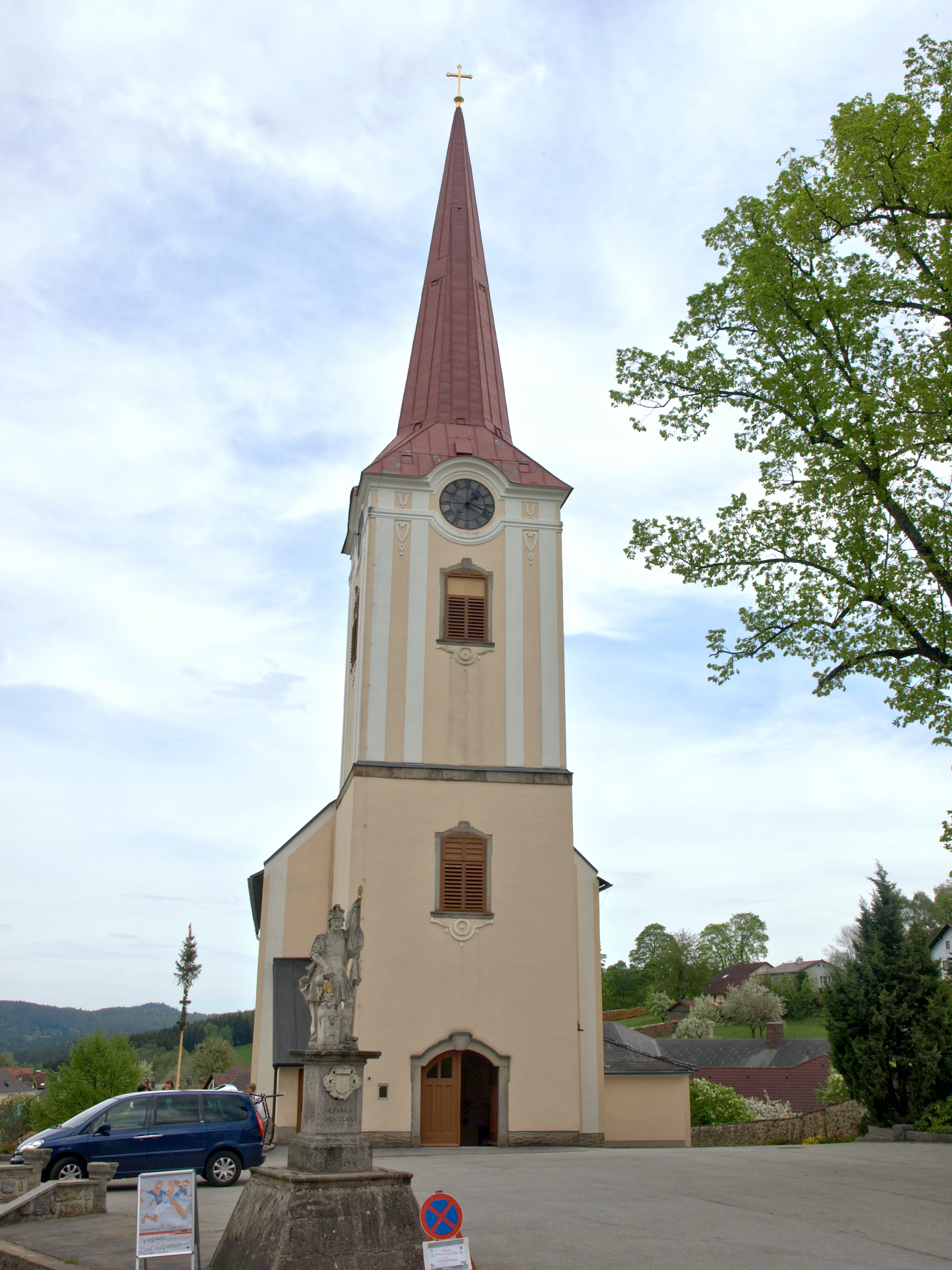 Kath. Pfarrkirche hll. Bartholomäus und Thomas